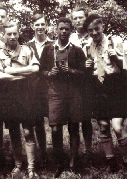 Le scout et résistant français Yves Goussard, mort pour la France en 1945.